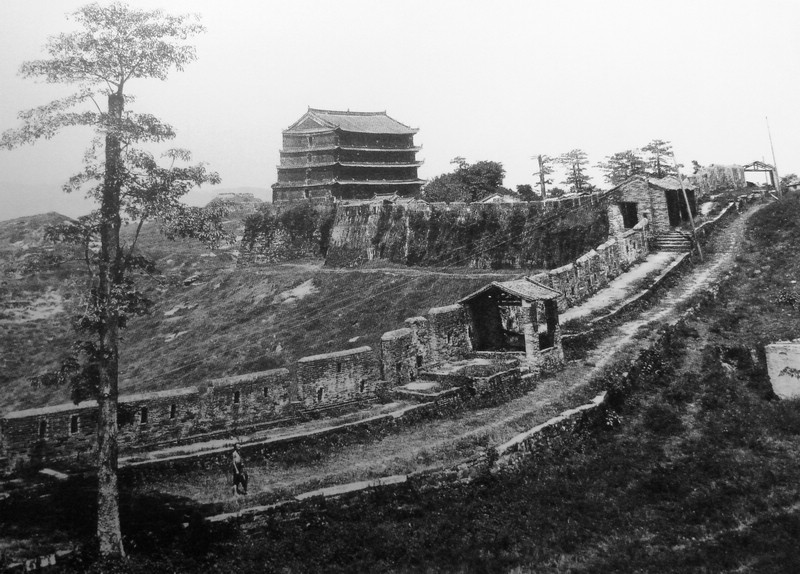 廣州觀音山（越秀山）城牆及鎮海樓。